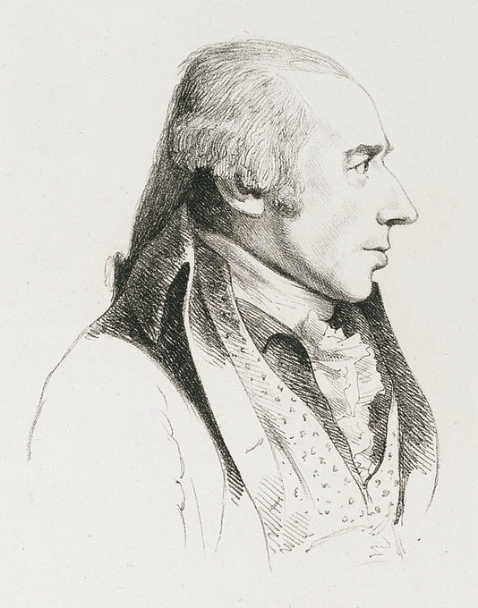 Английский художник - Уильям Ходжес